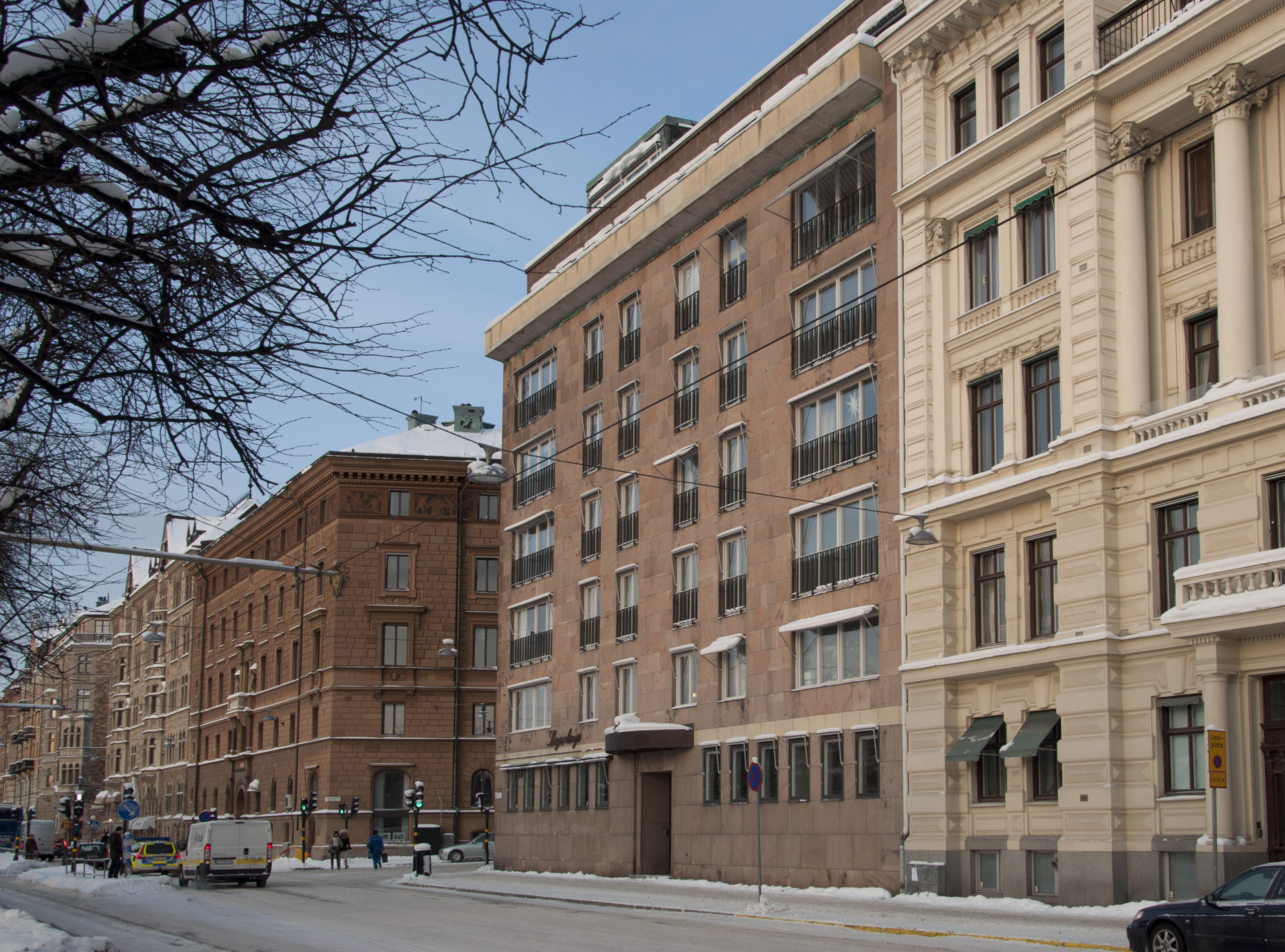 Strandvägen 23. Byggnadsår 1959-67, arkitekt Nils Tesch, byggherre Rederi AB Rex, byggmästare Widmark & Platzer AB.